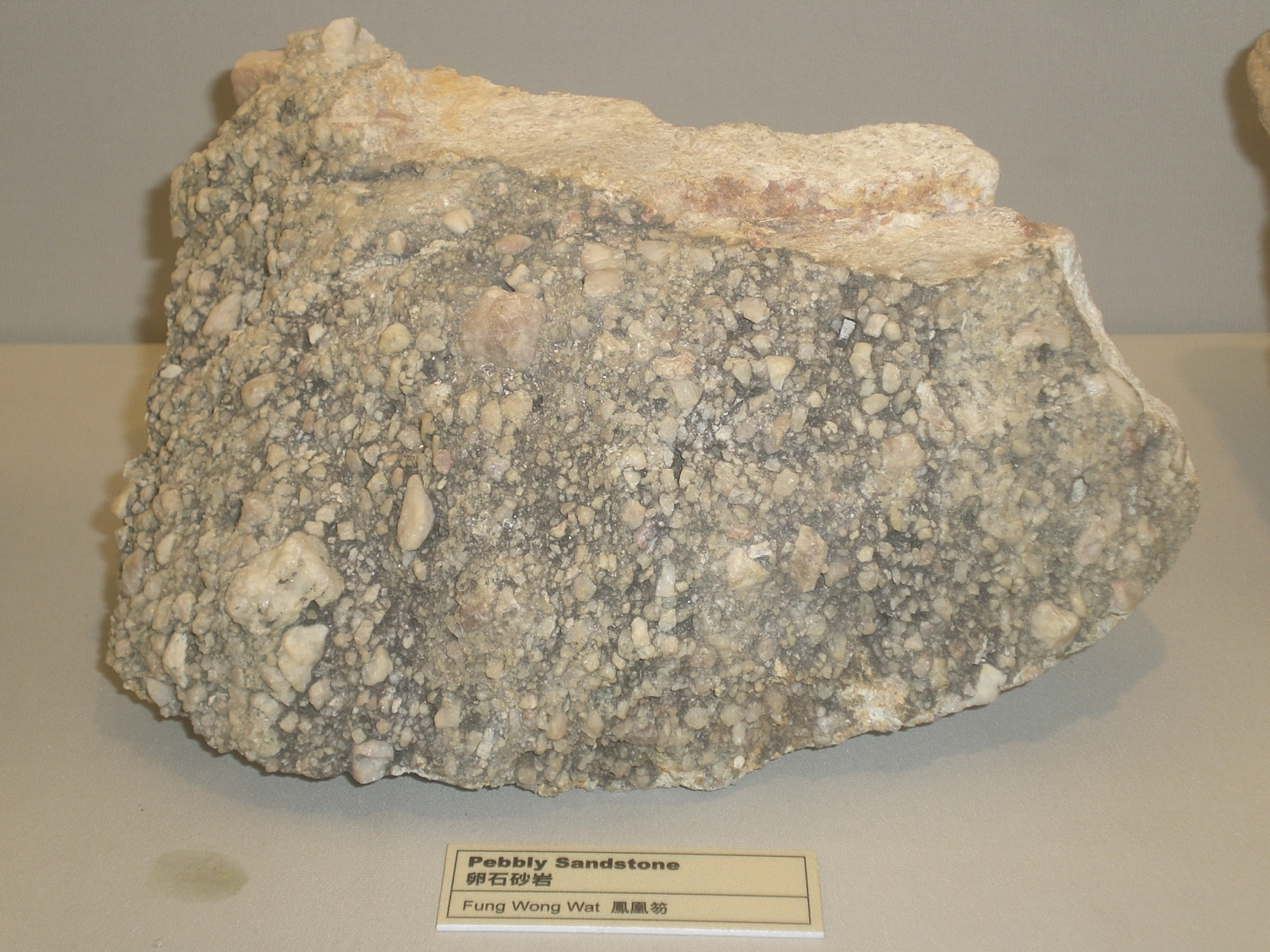 香港大學許士芬地質博物館 展品 方鉛礦